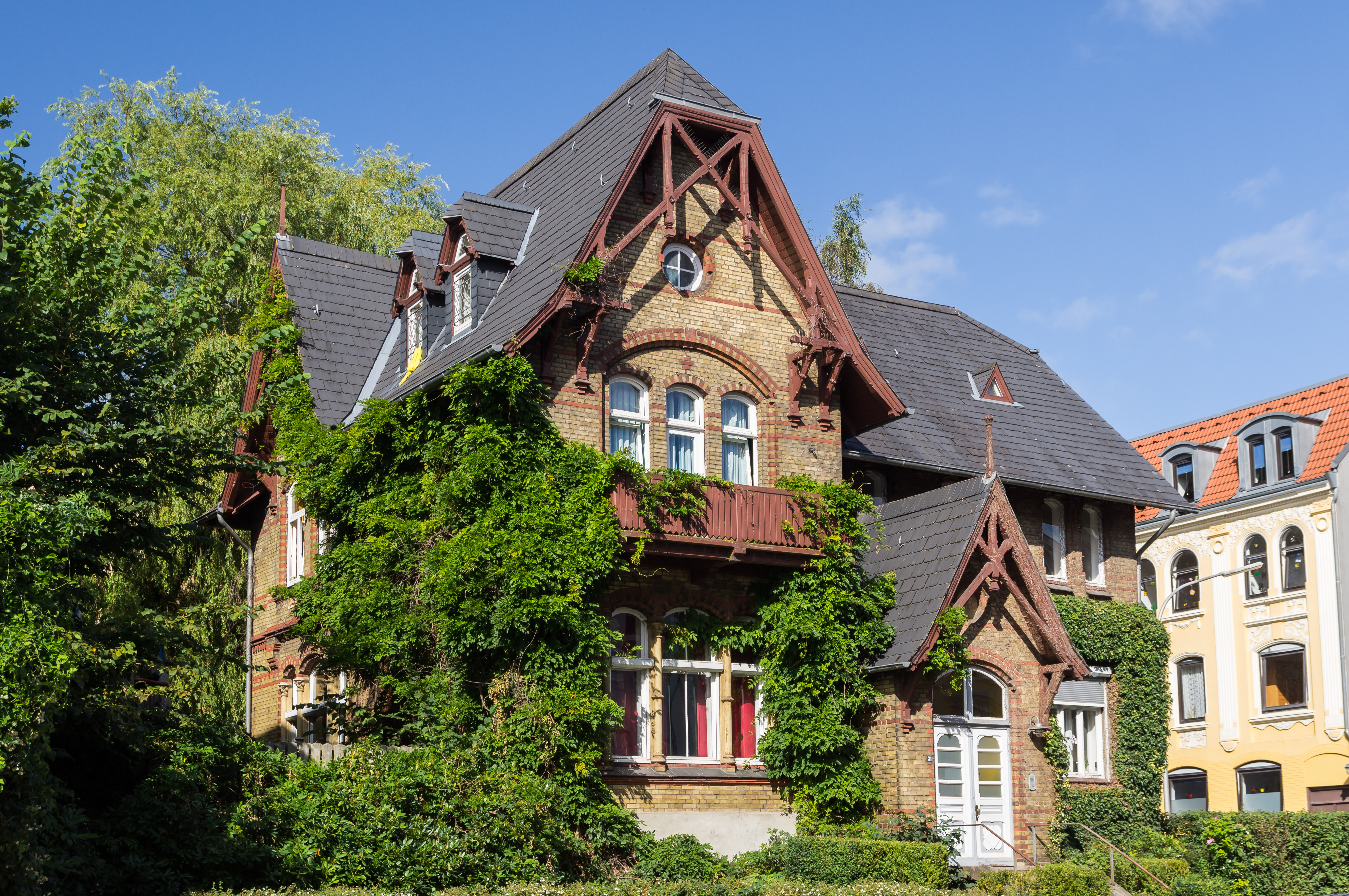 Flensburg-Nordstadt; Apenrader Strasse 13; Ehem. Fabrikantenvilla; Denkmal-Nr. 4